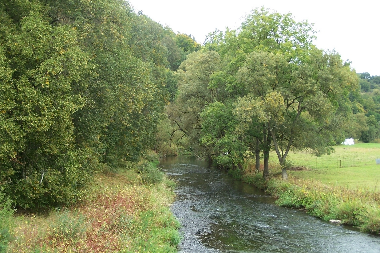 Die Ulster in Pferdsdorf (Unterbreizbach).